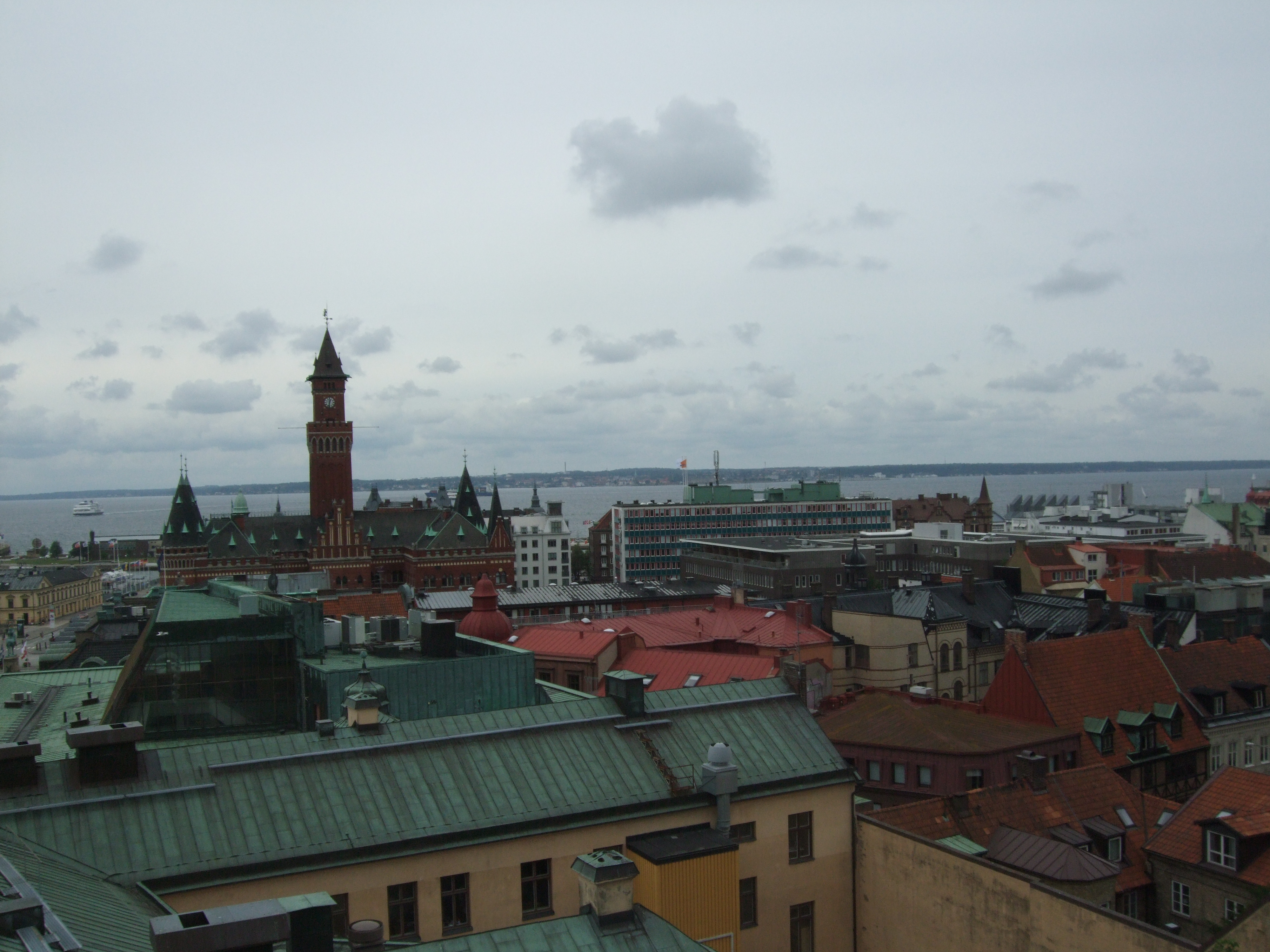 Панорама на Хелсингборг